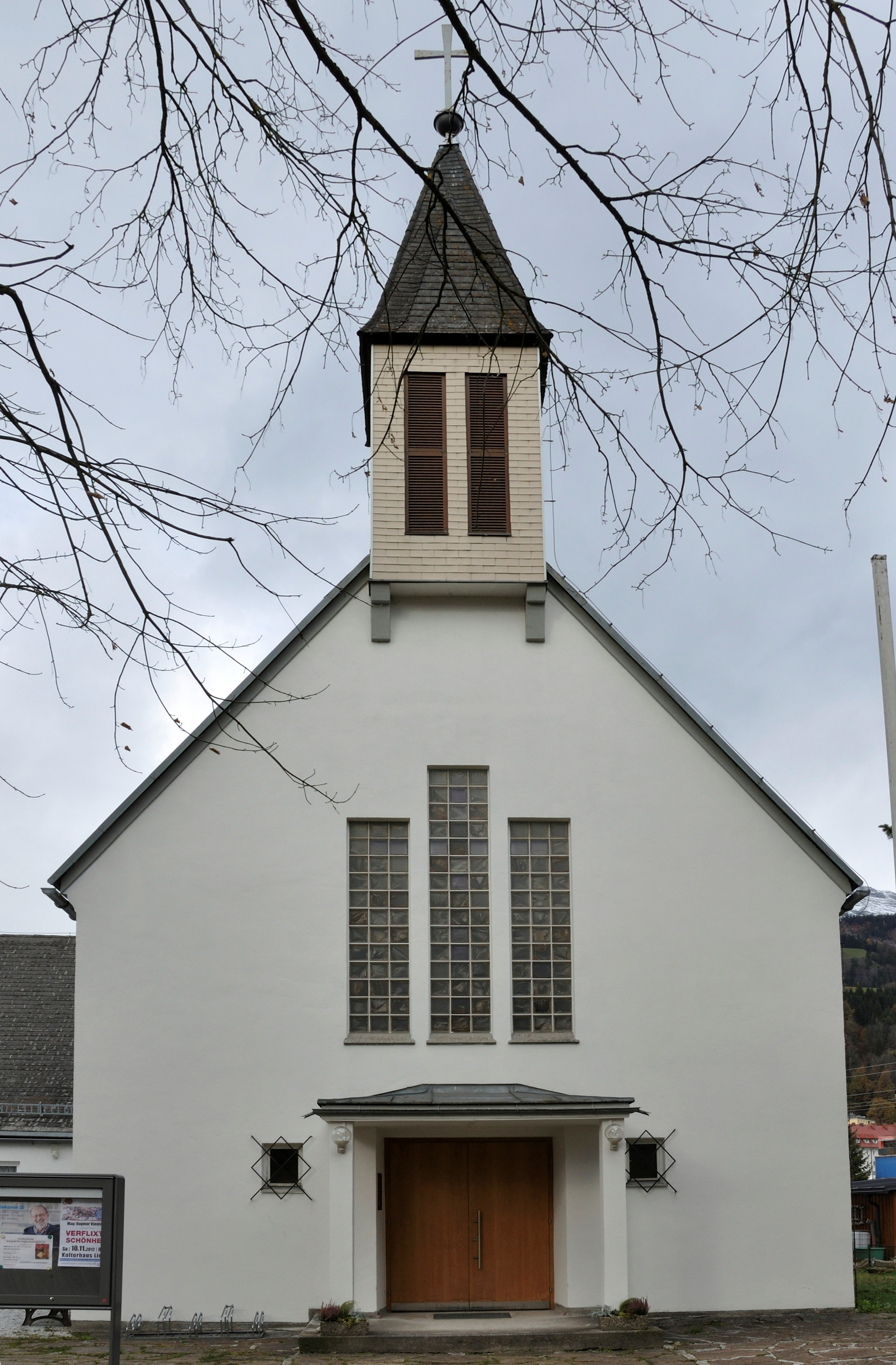 Evang. Pfarrkirche A.B.